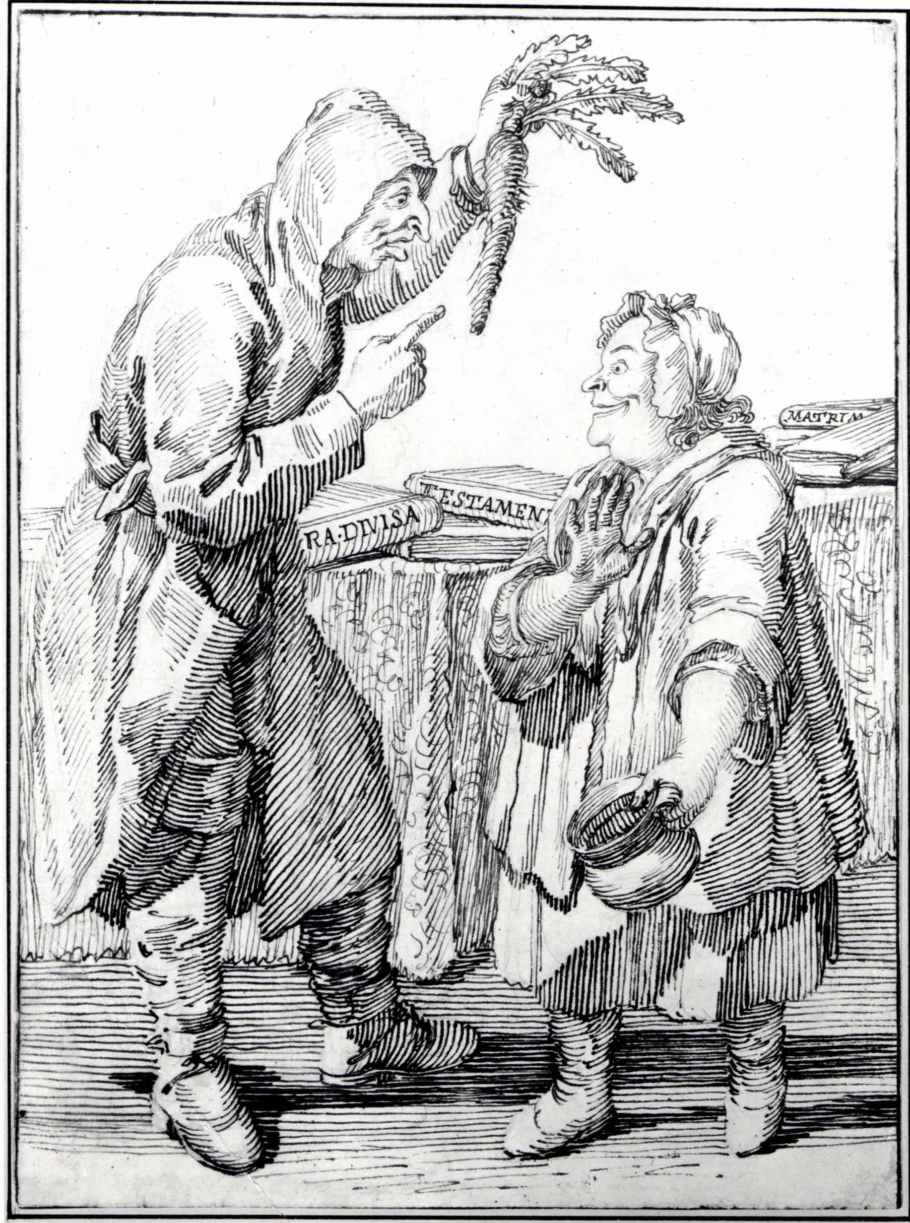 Drawing; Drawings